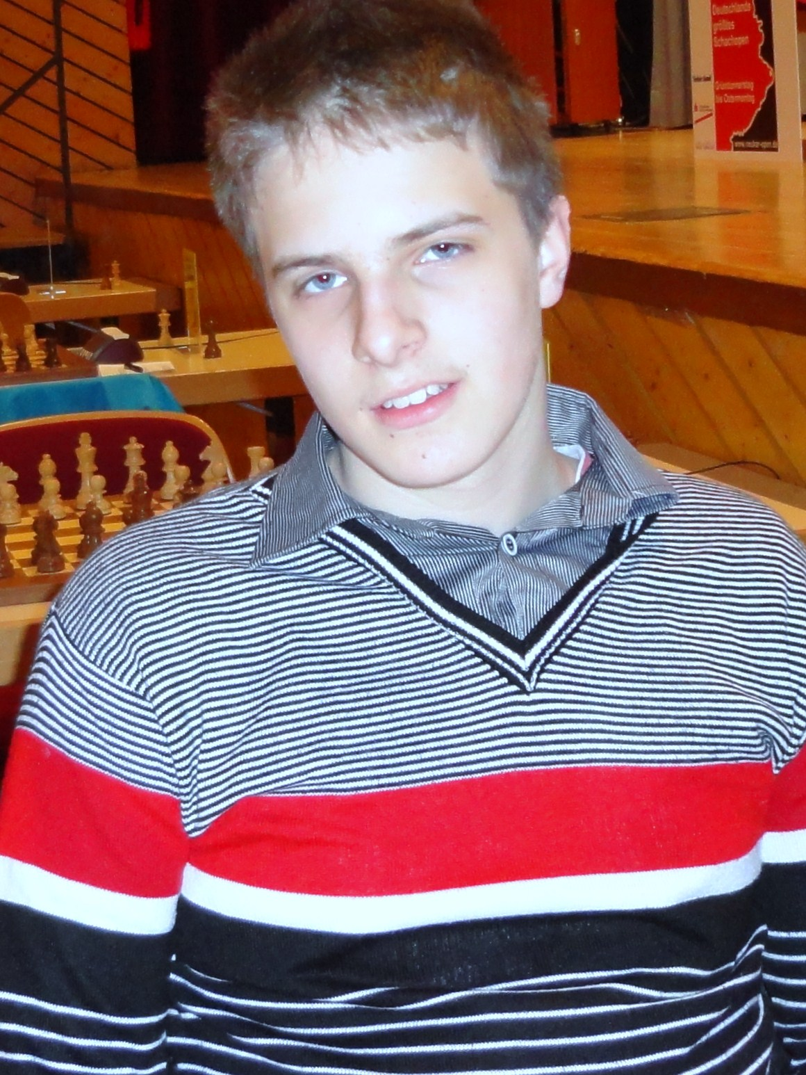 Richard Rapport, Internationales Schachturnier Neckar-Open 2012 in Deizisau.